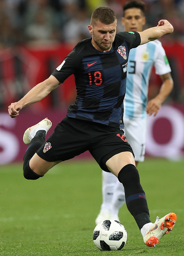 Это фиаско. Боль сборной Аргентины в фотографиях